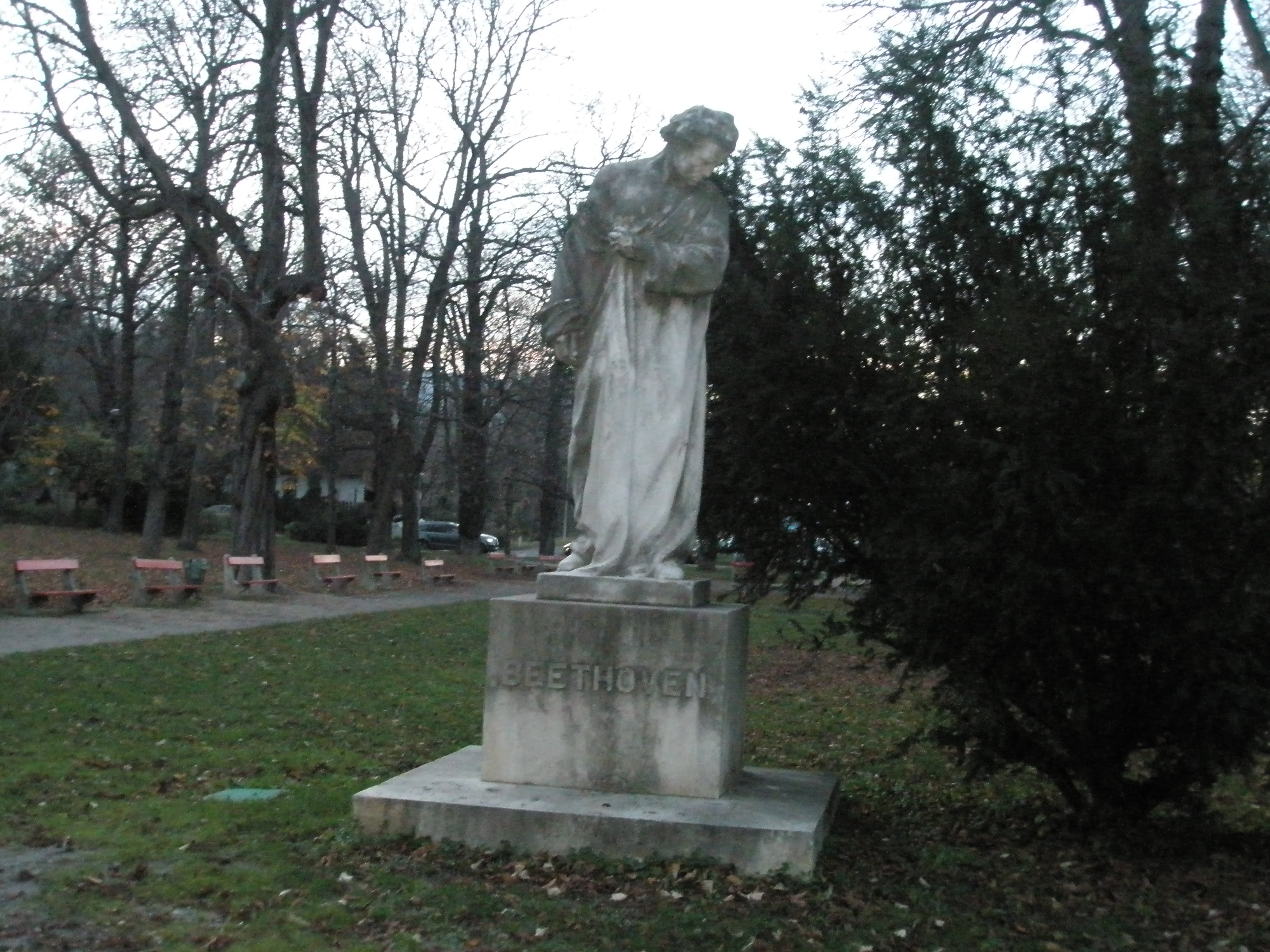 Ludwig van Beethoven szobra (Horvay János, 1932). - Budapest, XII. kerület, Városmajor, Városmajori parkban, a Temes utca közelében áll az alkotás.